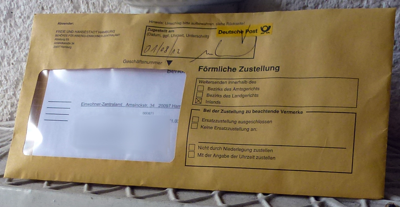 Umschlag zu einer förmlichen Zustellung mit Zustellungsurkunde, in dem sich das zuzustellende Dokument befindet.